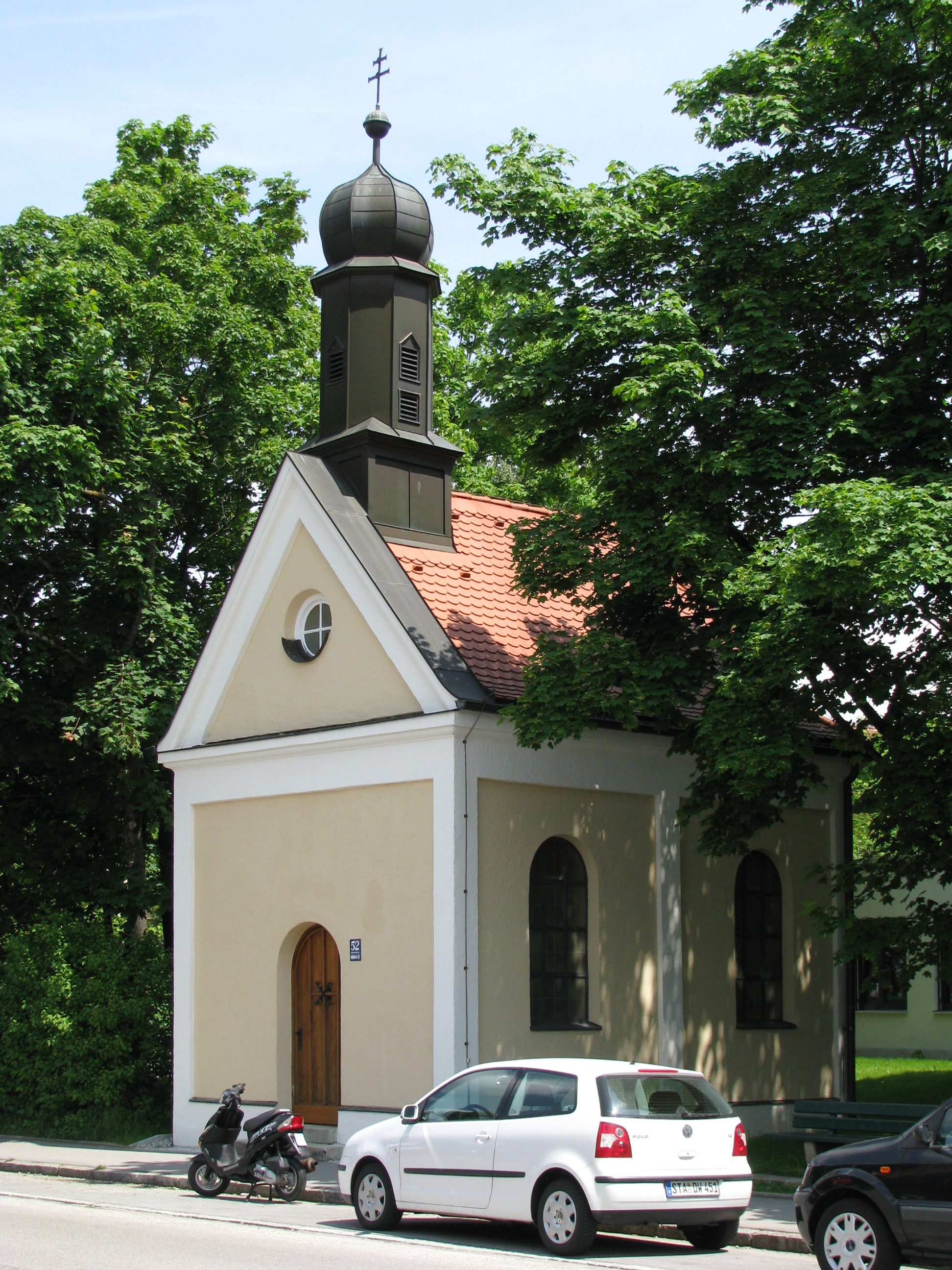 Kath. Kapelle St. Leonhard in der Großhaderner Straße in München.